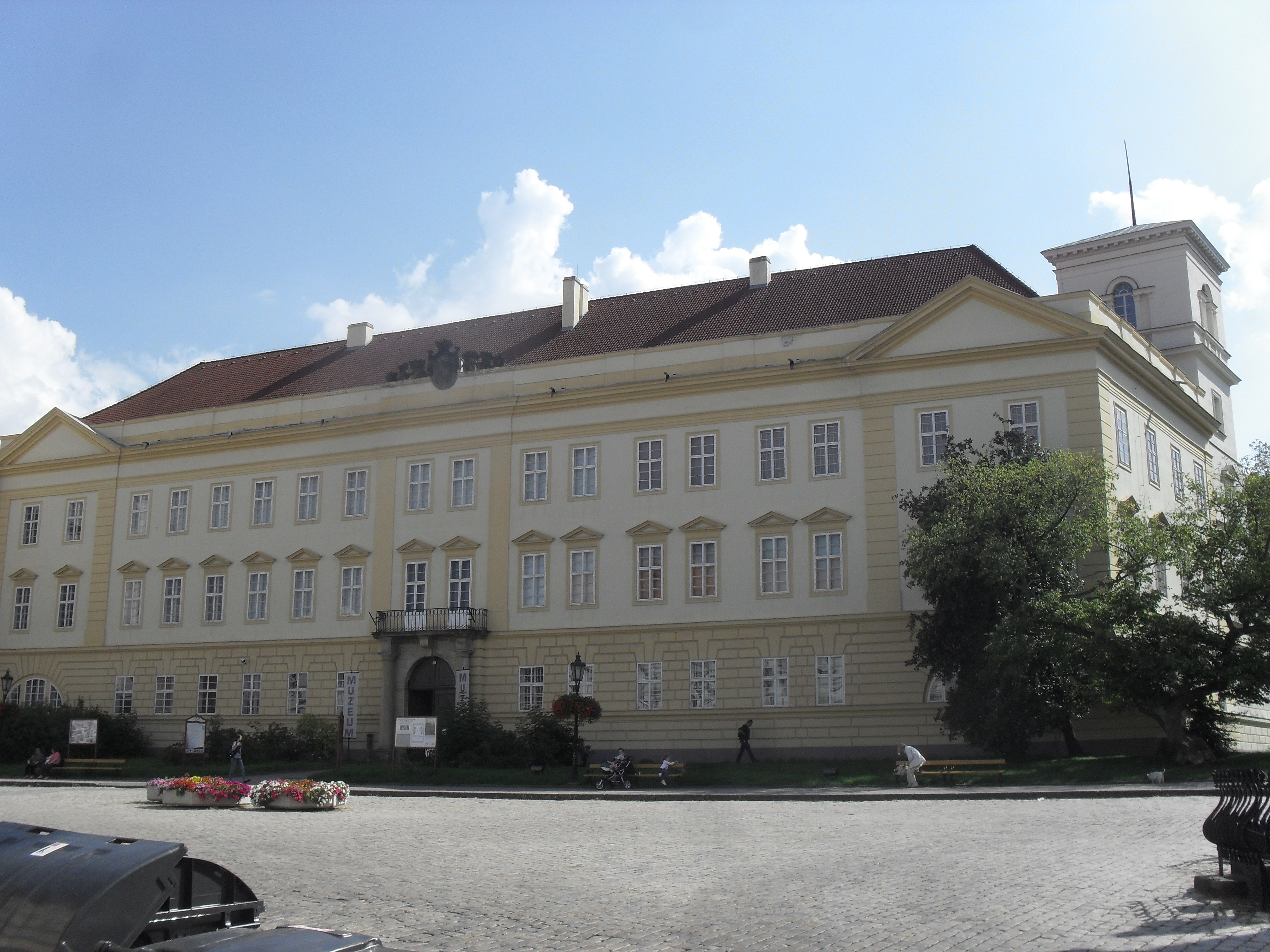 TTO: Děkanství - Teplice, Zámecké náměstí 71.